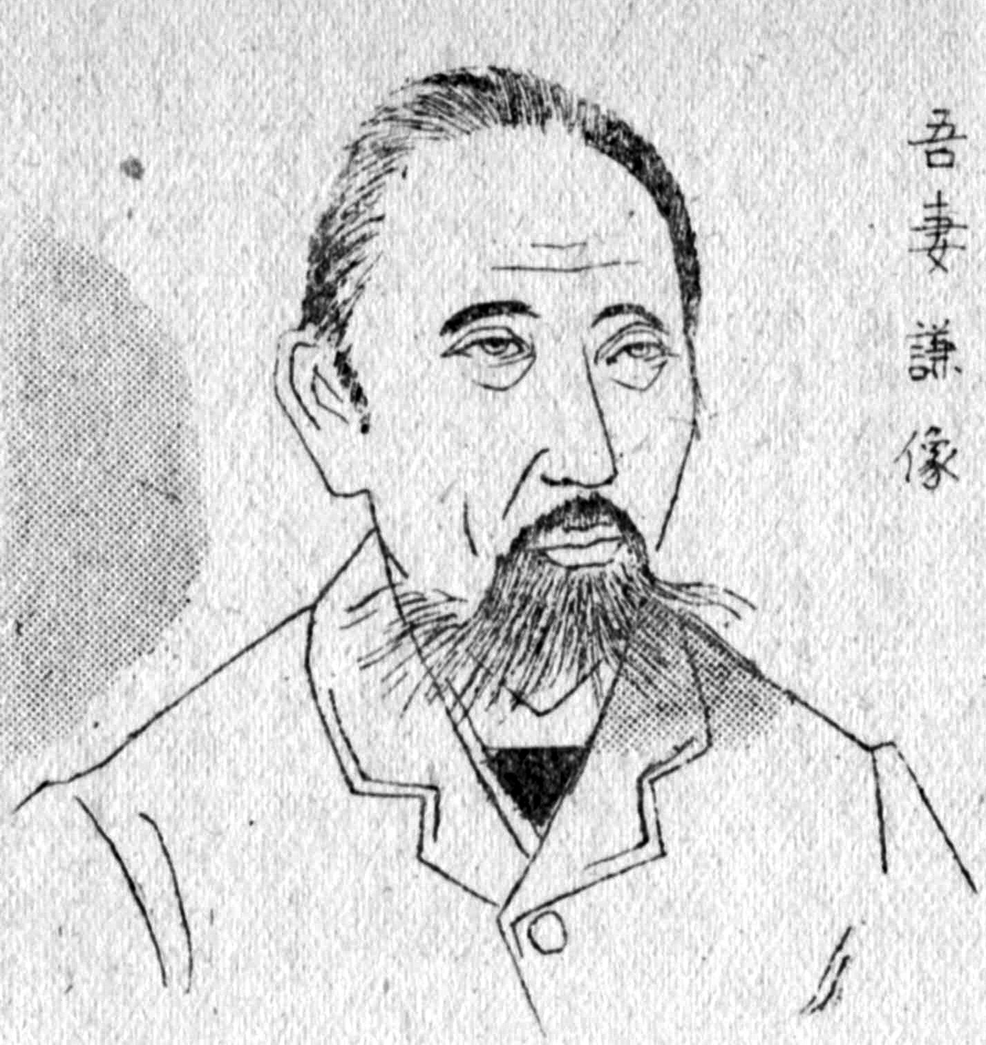 昭和22年刊『北の先覚』（北日本社）に掲載。今田敬一・画